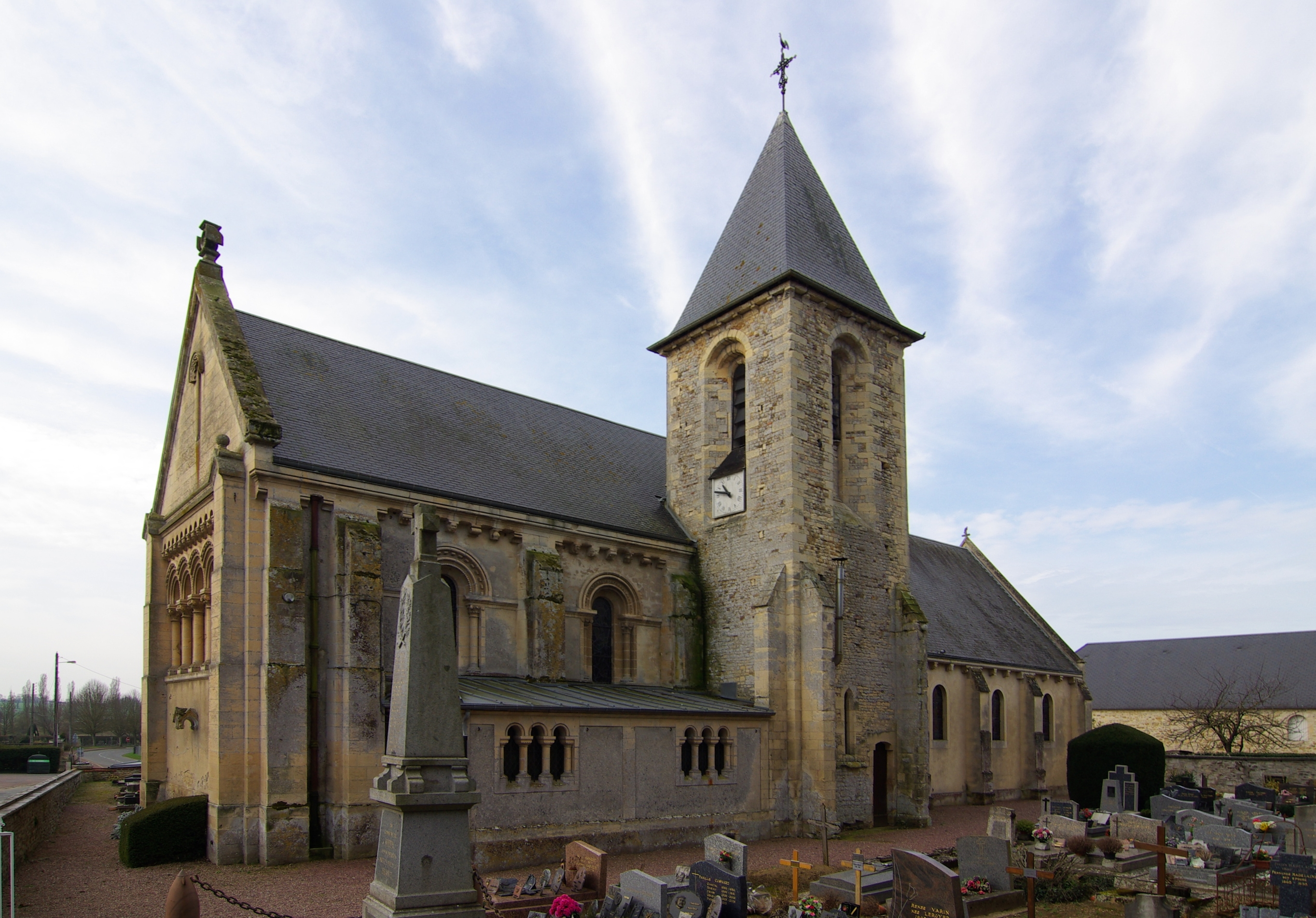 L'église Saint-Laurent à Vieux, Calvados.